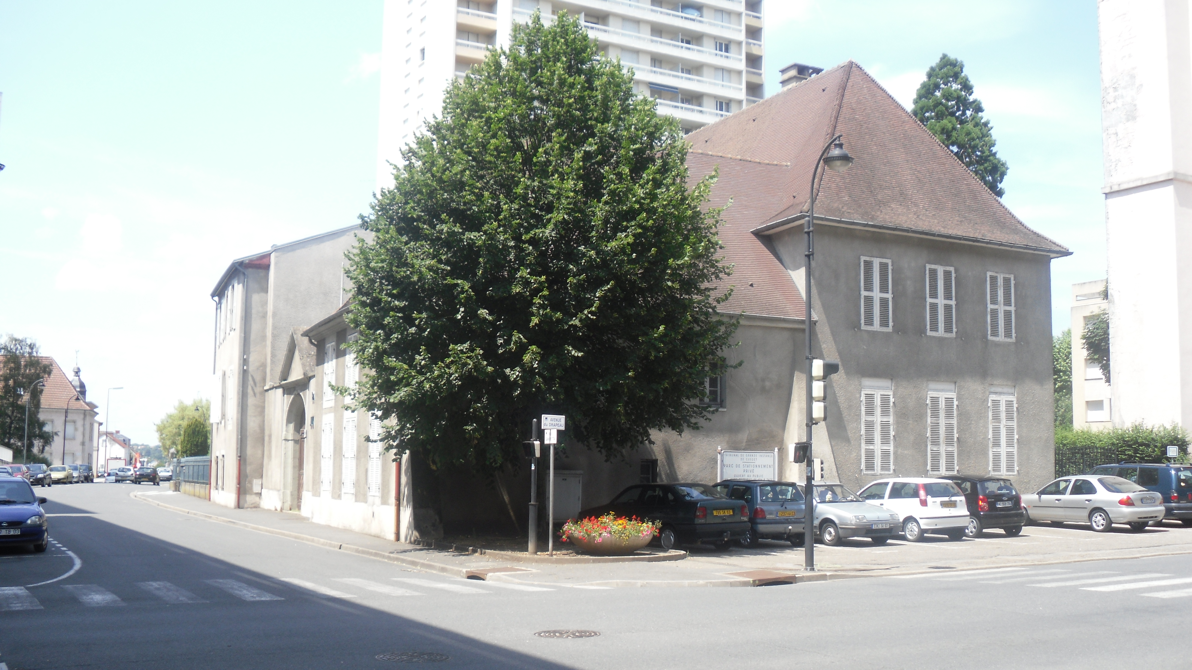 Tribunal de Grande Instance de Cusset dans l'Allier